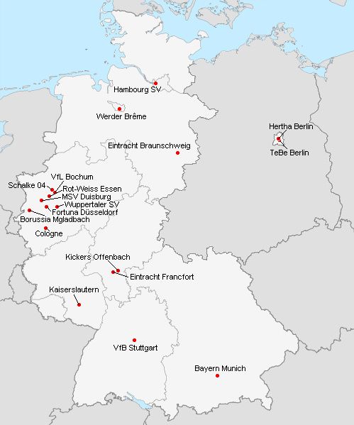 Répartition des clubs en 1.Bundsliga 1974-1975.